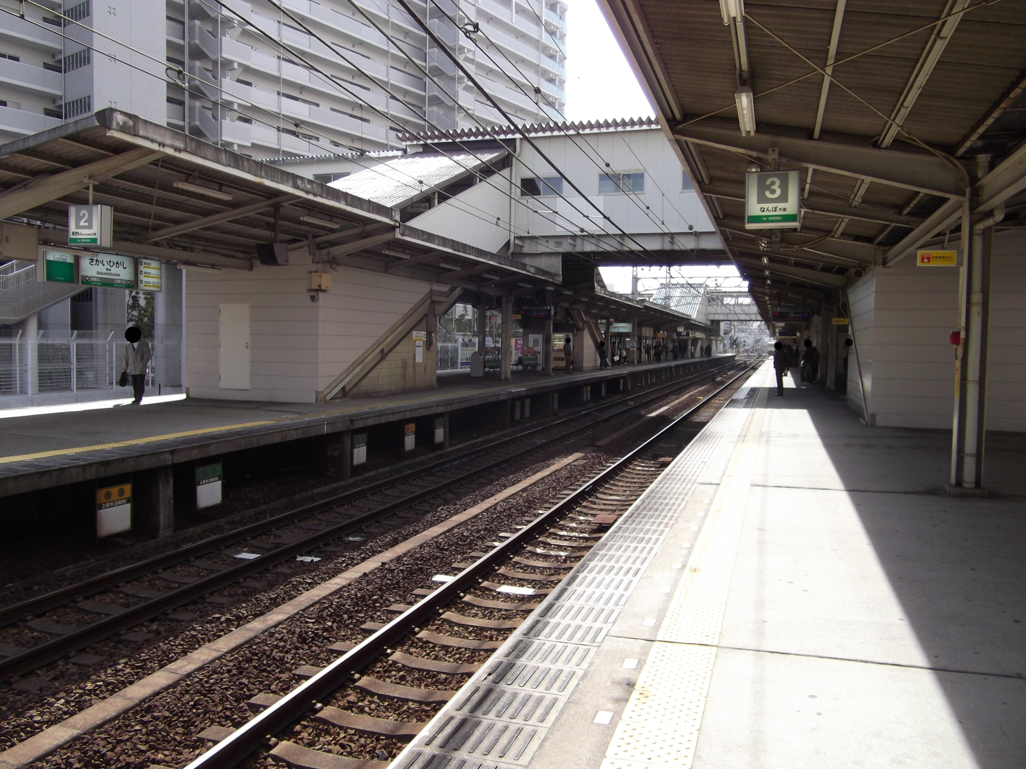 南海高野線堺東駅のホーム（上りホームから高野山方面に向けて撮影）